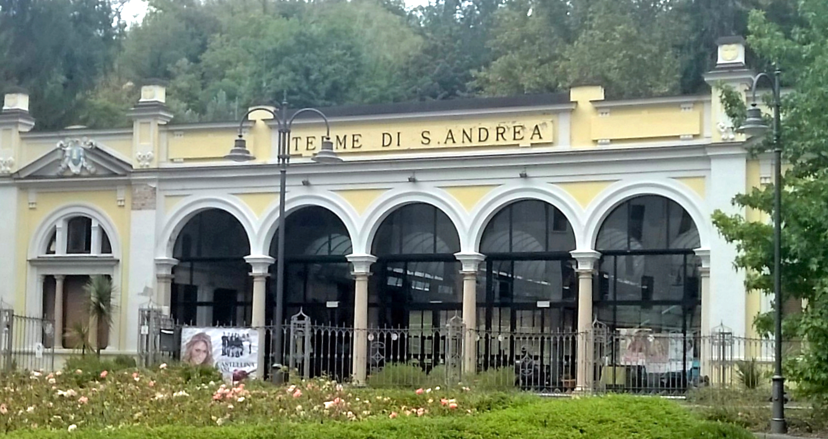 Terme di Sant'Andrea a Bagni, Parco frlla Mescita.